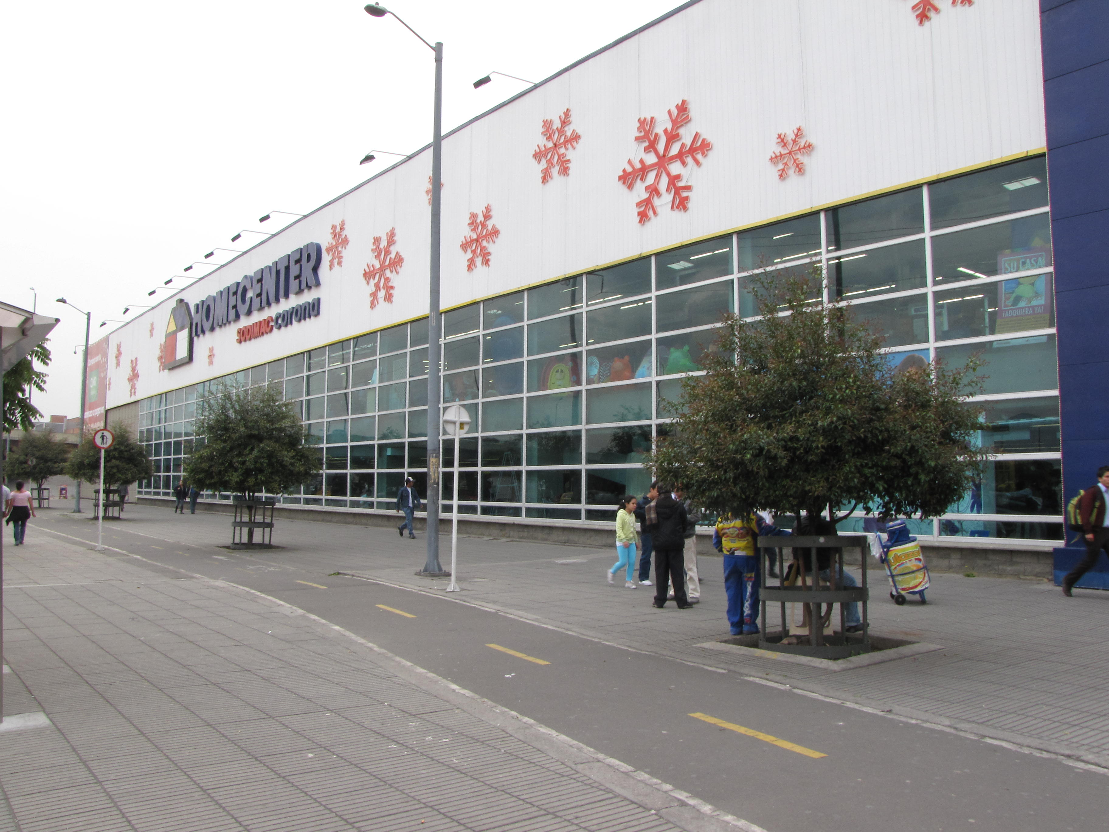 Shopping 007